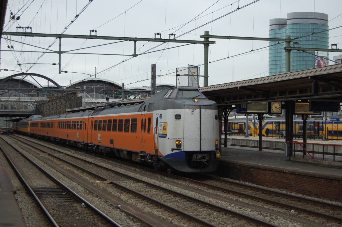 4241 en 4088,Utrecht.